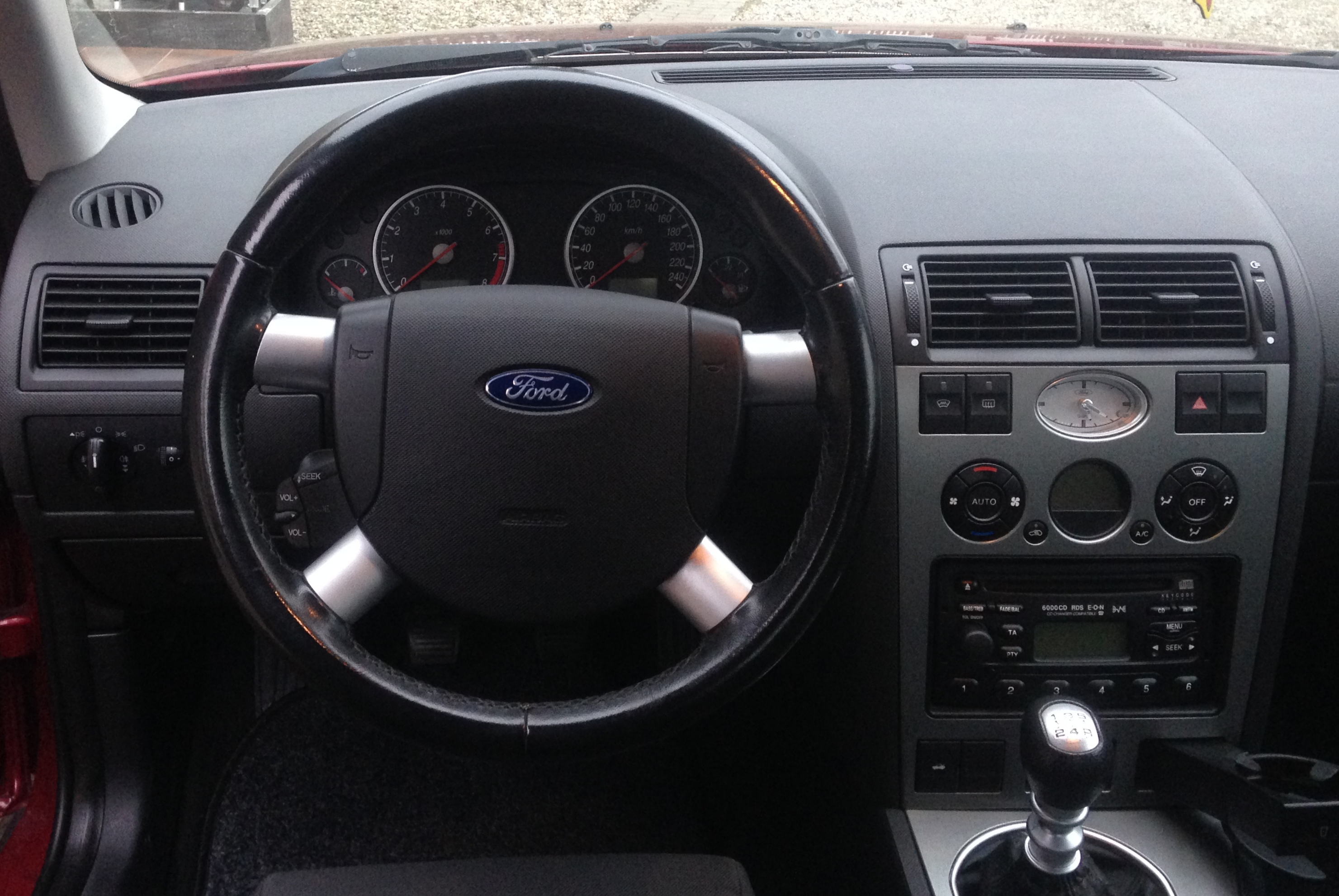 Wnętrze Forda Mondeo Mk3 Trend